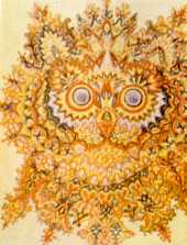 Gato Psicótico no estado 4 criado pelo autor.